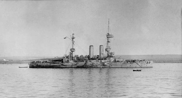 HMS VENERABLE in Malta Harbour, 1915